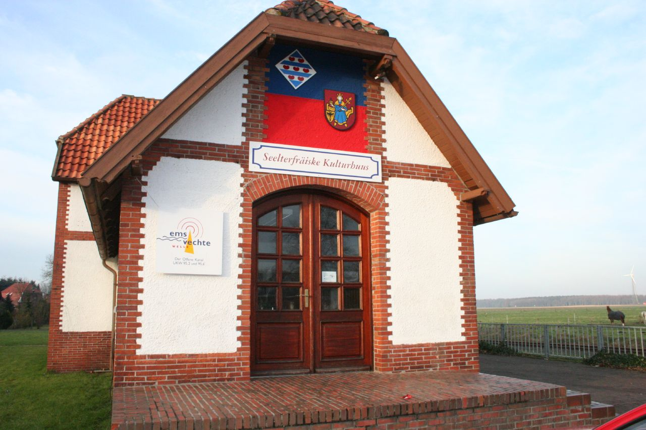 Der alte Bahnhof in Scharrel (Saterland), heute das Saterfriesische Kulturzentrum ("Seelterfräiske Kulturhuus") des "Seelter Buund", beherbergt u.a. eine Außenstelle der Ems-Vechte-Welle. Oben sind die Farben des Seelter Buund mit dem Seelter Wappen und den friesischen Farben zu sehen. Seeltersk: Die oolde Boanhoaf fon Schäddel, däälich dät Seelterfräiske Kulturhuus fon dän Seelter Buund, behärbierget u.u. ne Buutensteede fon ju Ems-Vechte-Welle. Buppe sunt do Faawen fon dän Seelter Buund mäd dät Seelter Woapen un do fräiske Faawen tou sjoon.